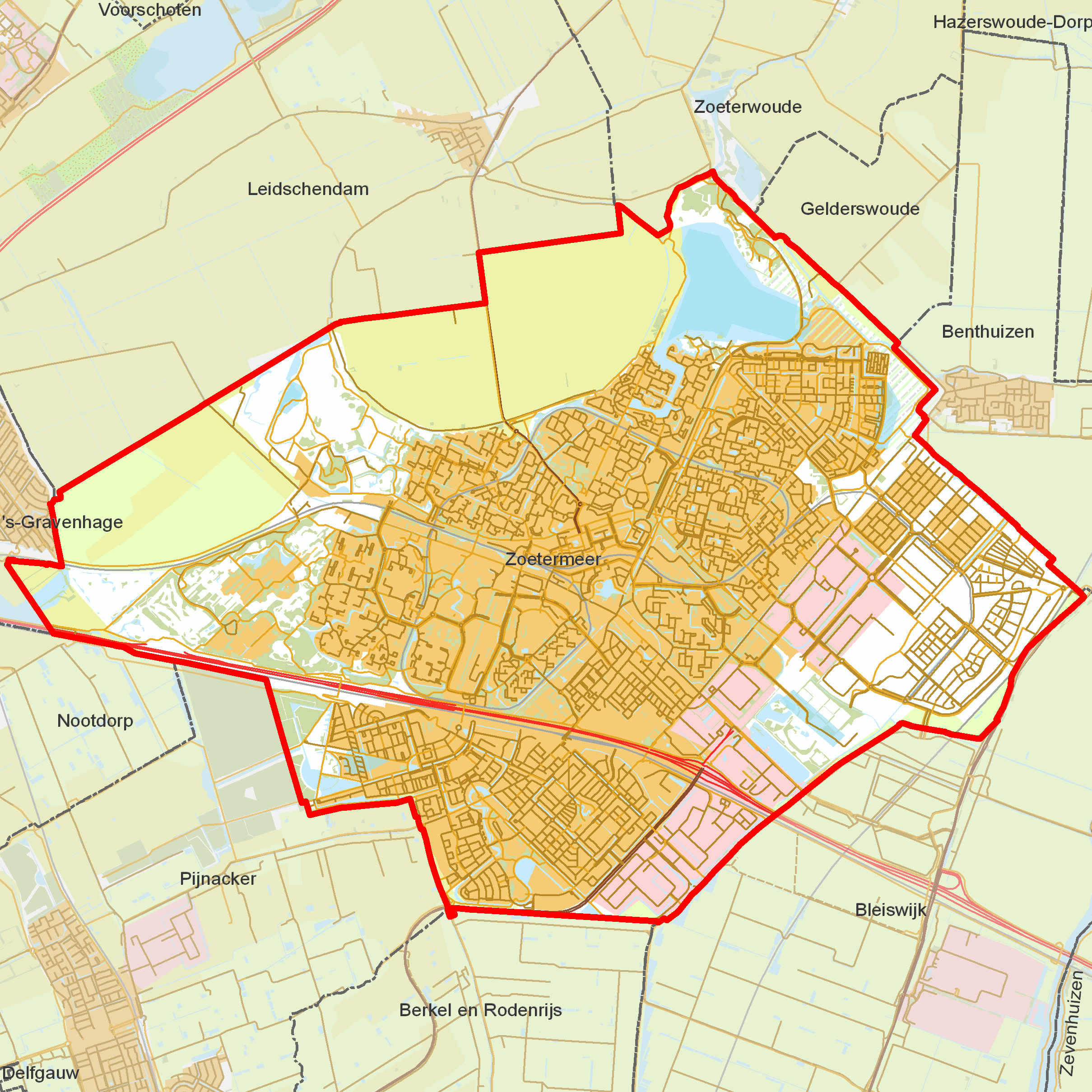 BAG woonplaatsen - Gemeente Zoetermeer.png